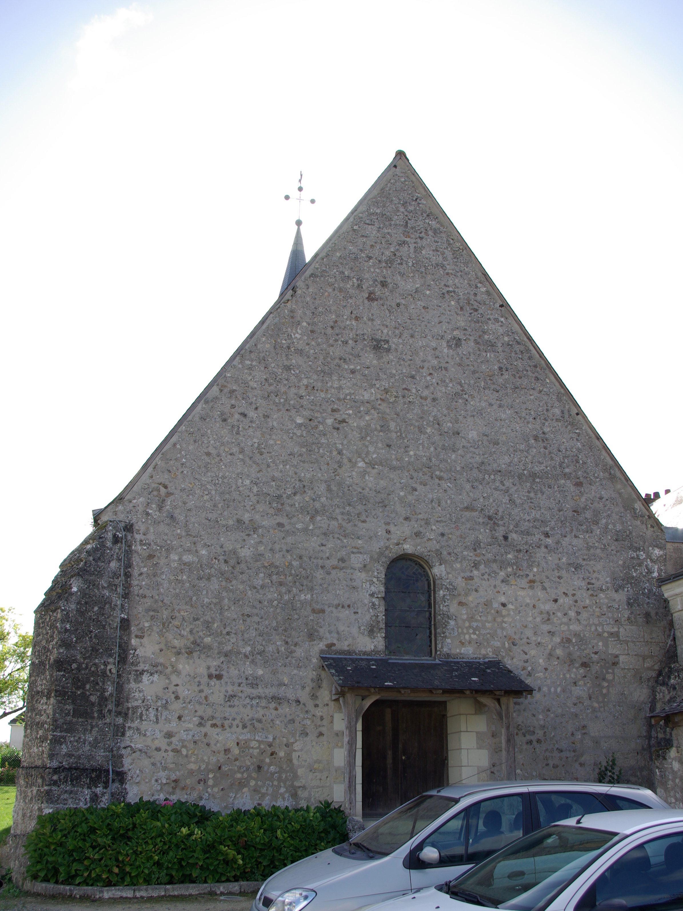 Église Saint-Pierre de Parçay-Meslay. This building is en partie classé, en partie inscrit au titre des Monuments Historiques. .